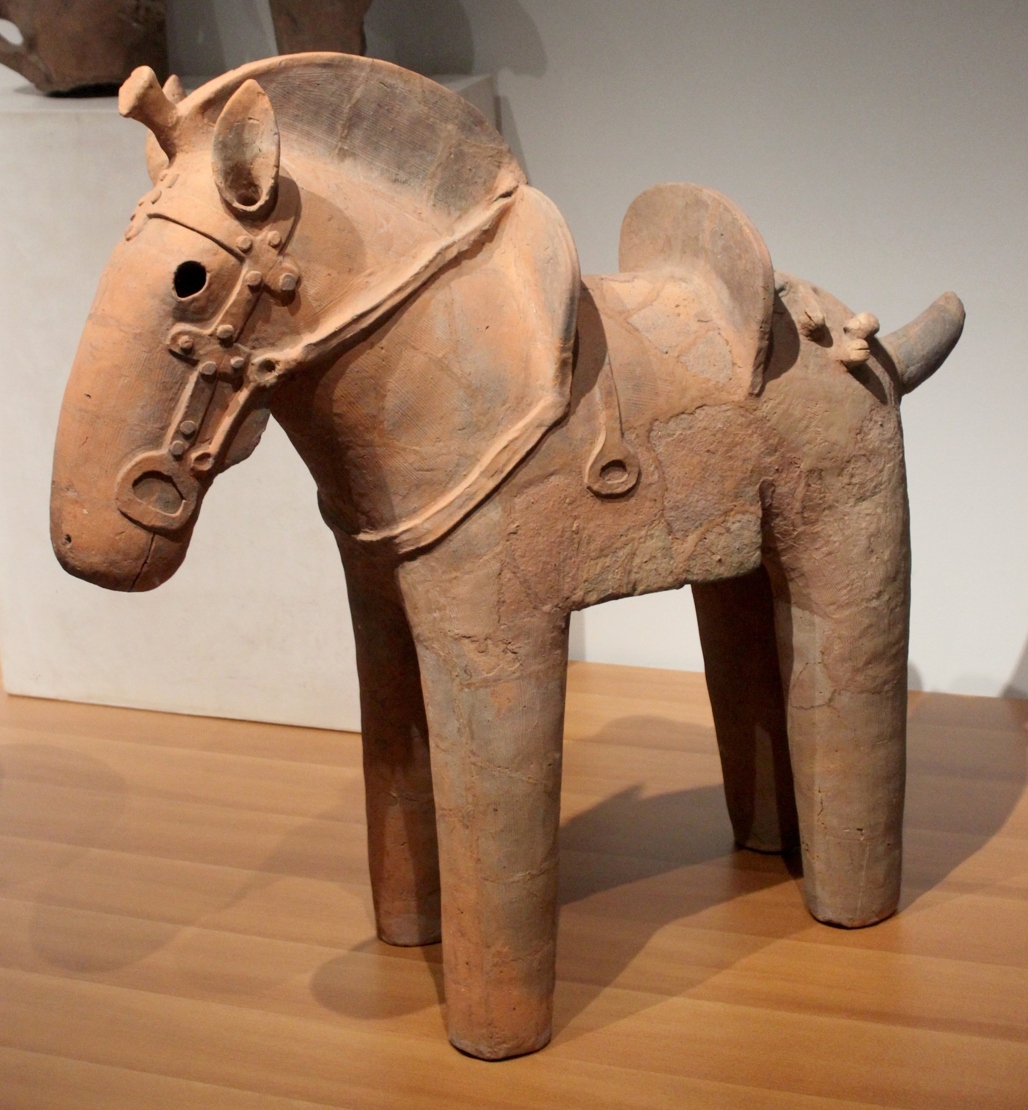 París, Musée Guimet. Haniwa.